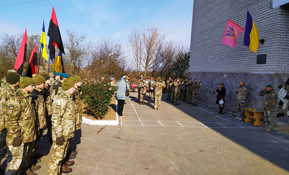 Открытие доски Савинову С.